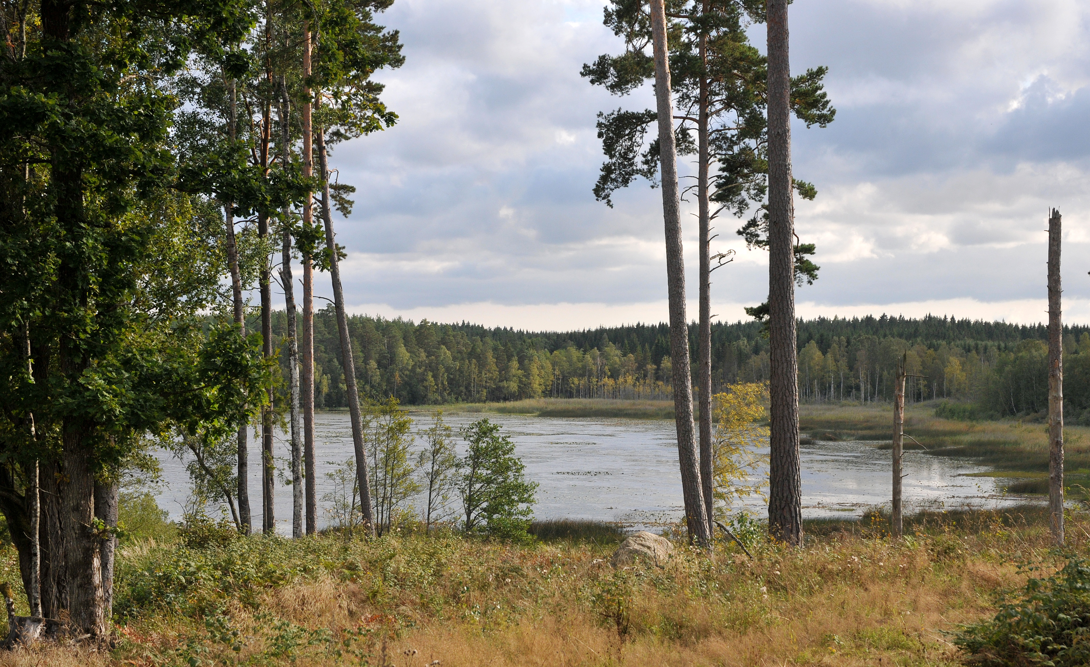 Översjön i Nyköpings kommun.